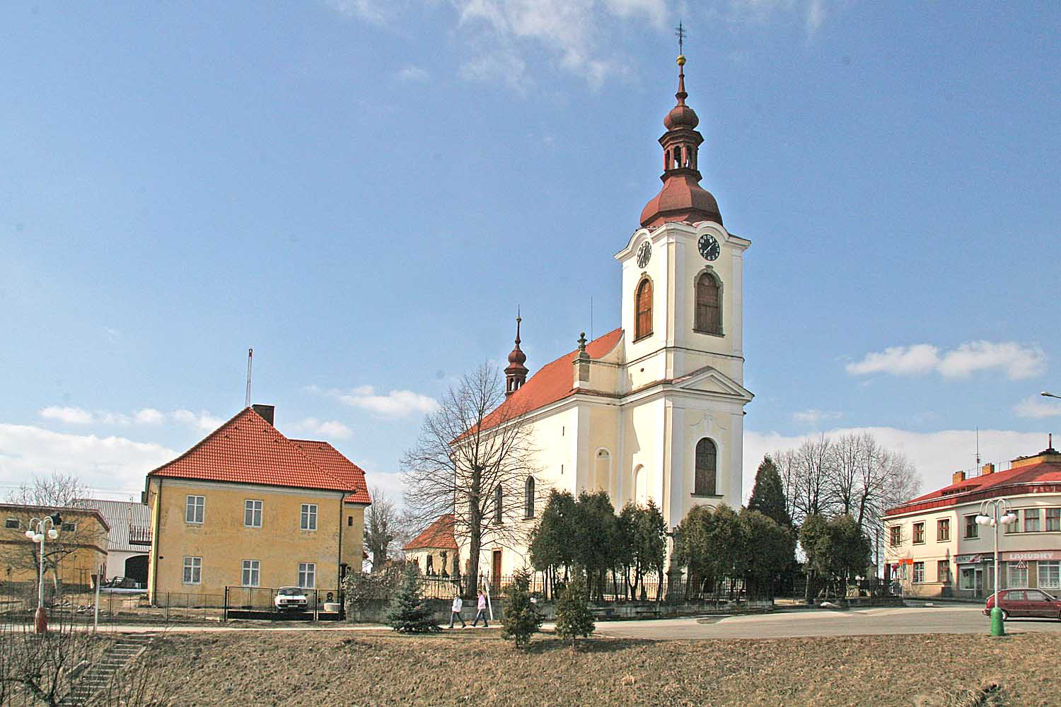 Kostel svaté Kateřiny, České Meziříčí, district Rychnov nad Kněžnou, Czech Republic autor: Prazak date: 23. 3. 2006